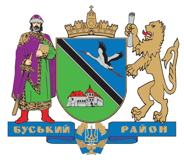 Герб Буського району